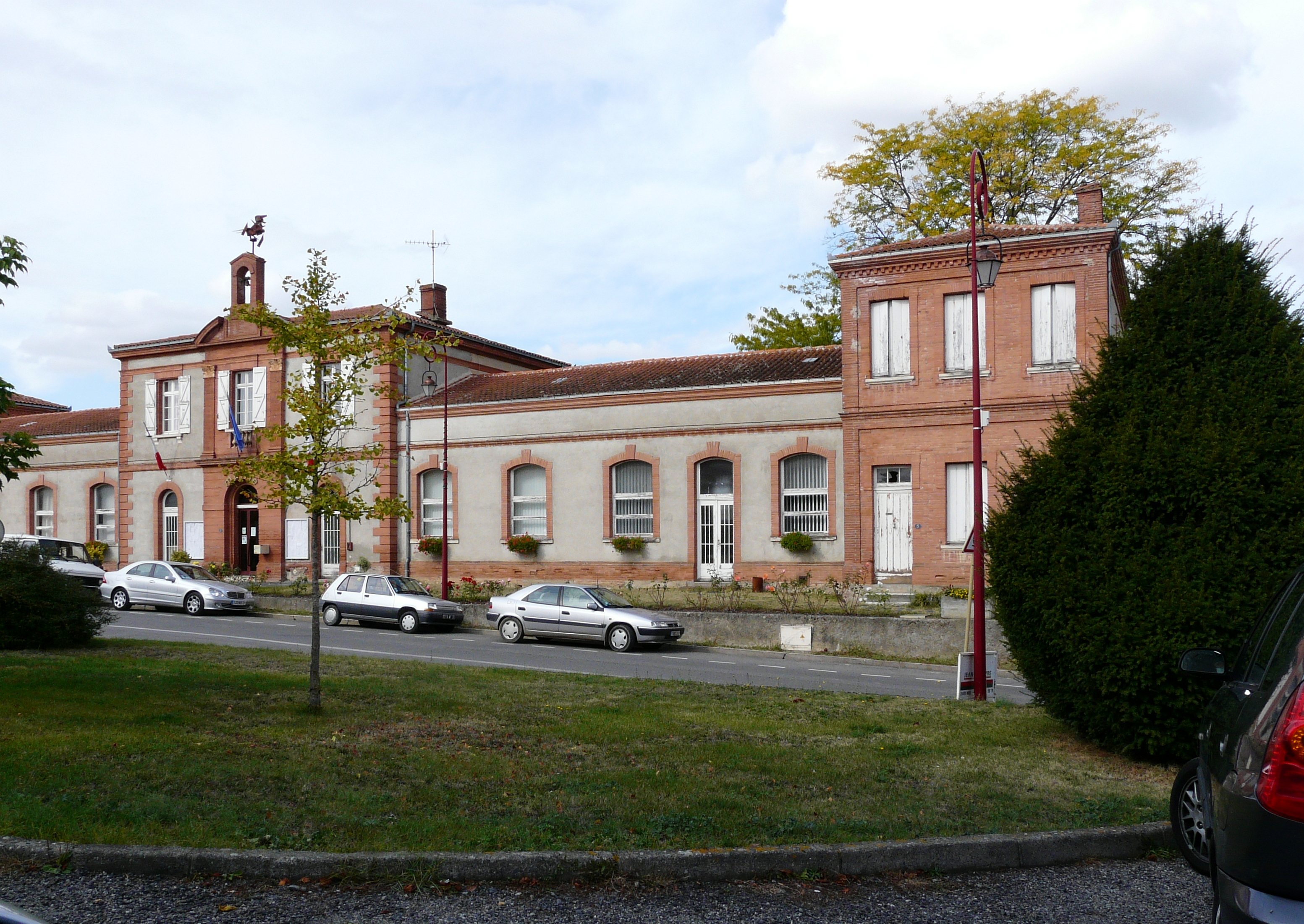 Mairie de Longages